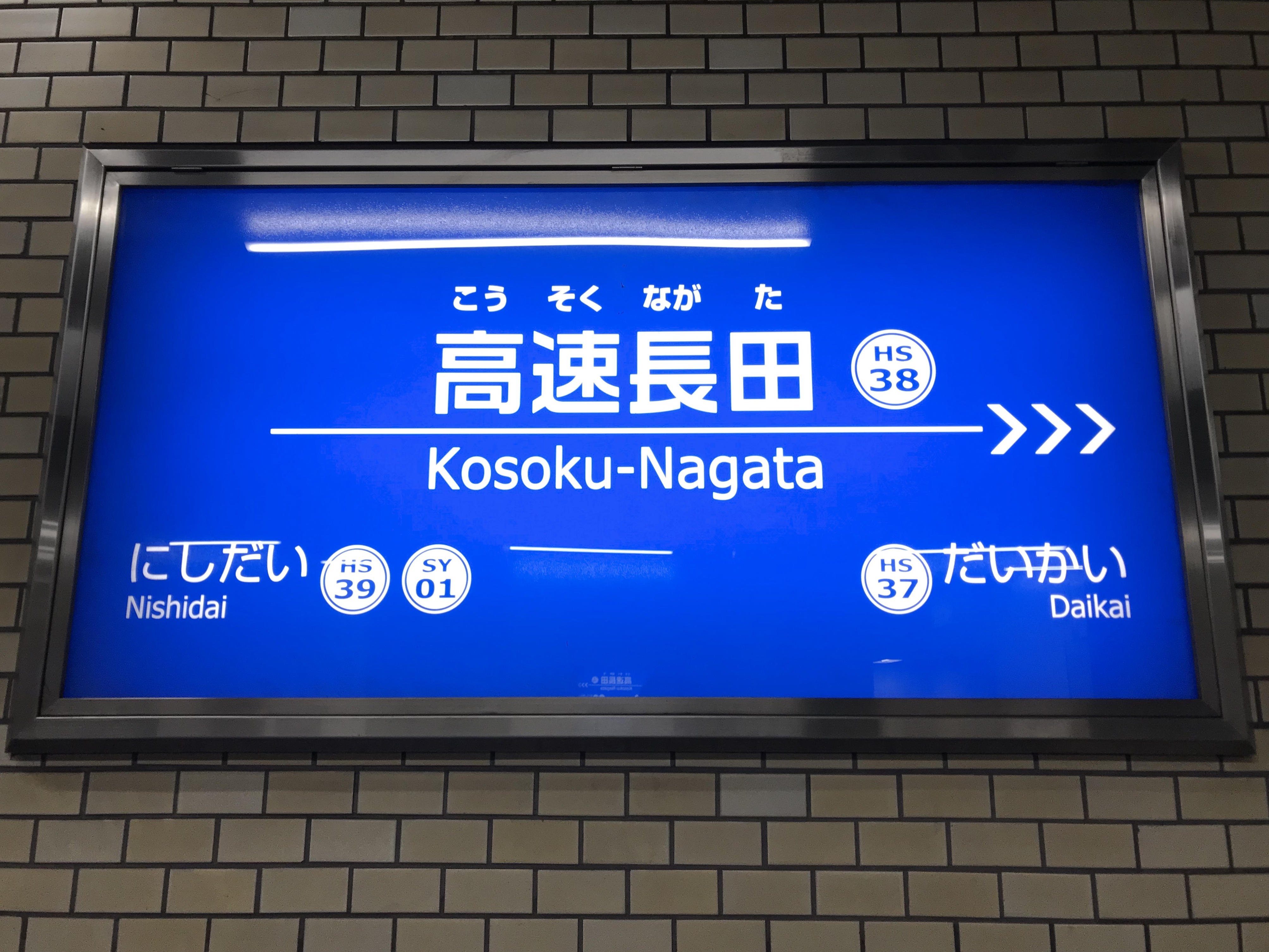 高速長田駅の駅名標